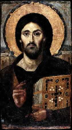 Afbeelding van Christus Pantocrator. Icoon van het Sint Catharinaklooster op de berg Sinai.